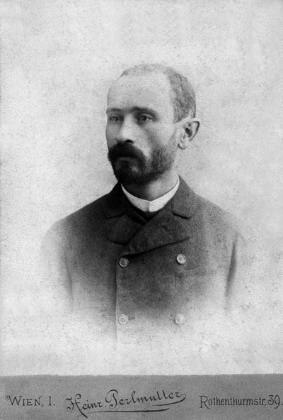 Alois Schweiger (1859–1928)